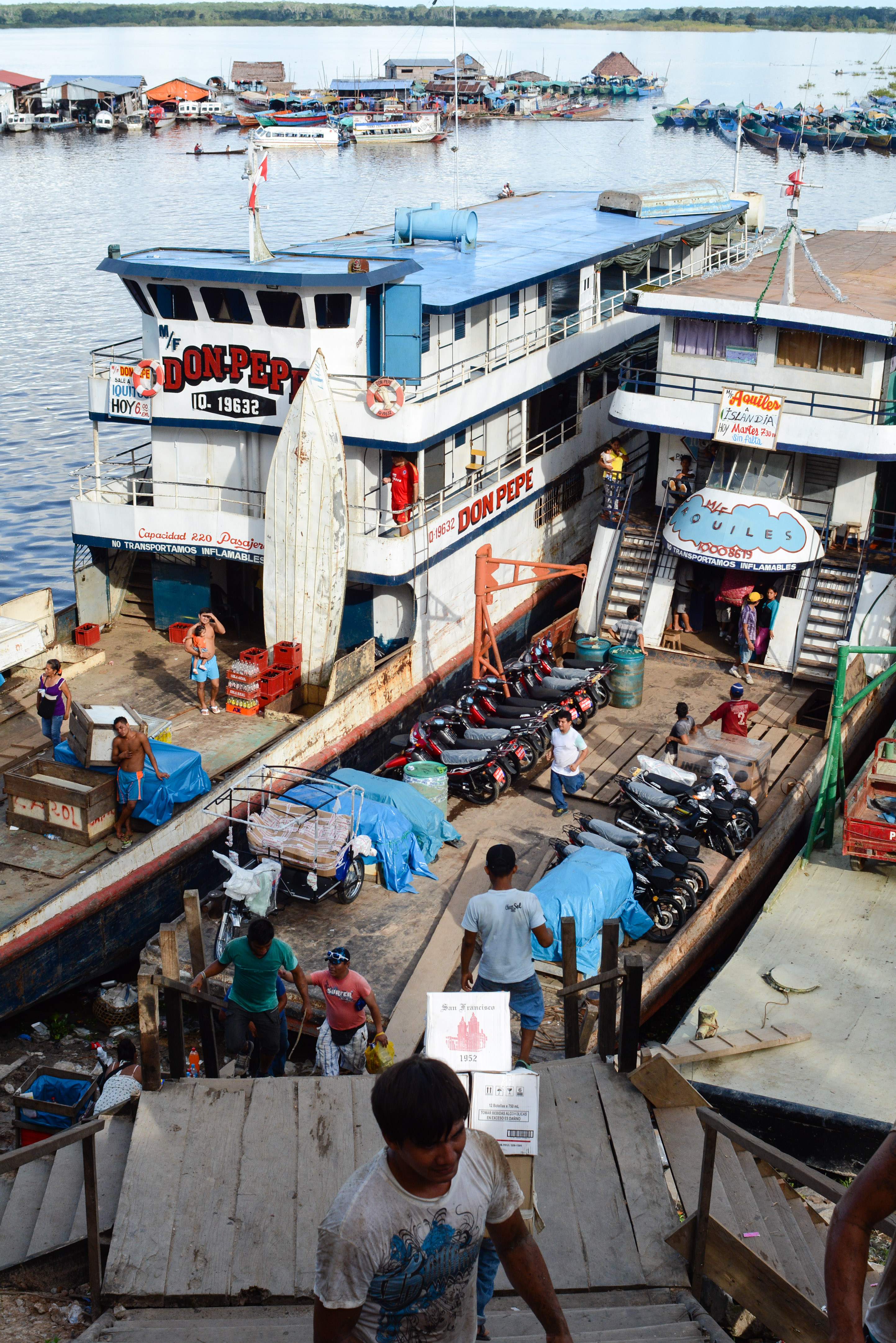 Iquitos, Peru